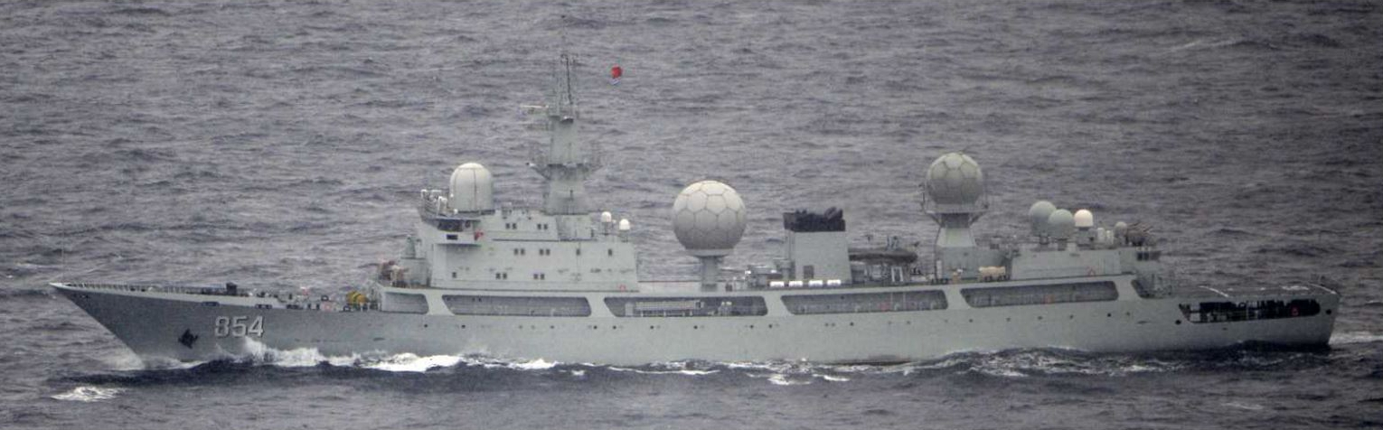 ２月４日（木）午前５時頃、海上自衛隊第４航空群所属のＰ－３Ｃが、房総半島南東の接続水域の外側の海域を南西進する中国海軍ドンディアオ級情報収集艦１隻を確認しました。 ８日（月）午前７時頃にかけて、当該情報収集艦が同海域において、北東と南西の方角に複数回往復して航行したことを確認しました。 その後、当該艦艇が、三宅島と八丈島の間を南西に向け航行したことを確認しました。